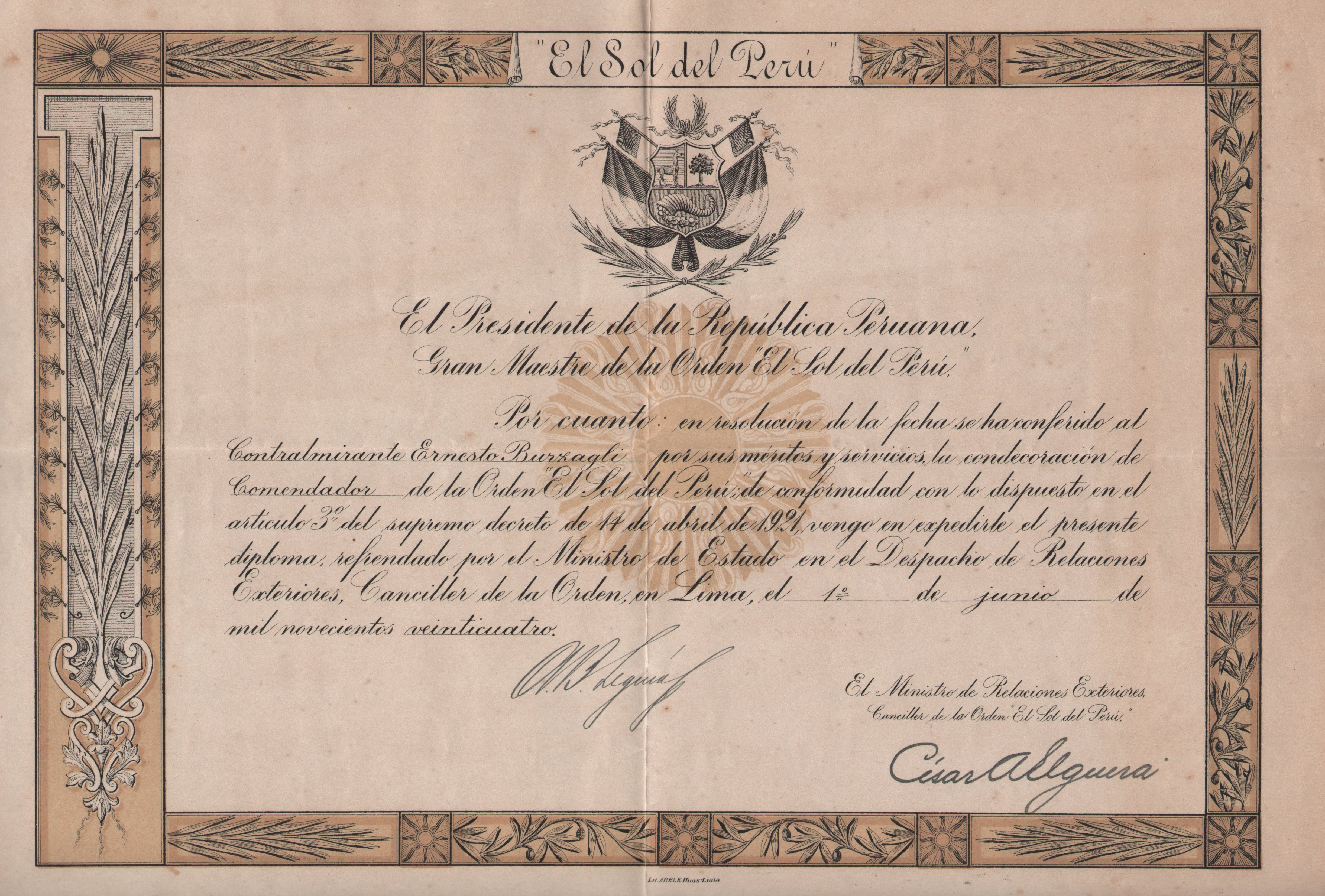 Award "Orden del Sol de Perù"